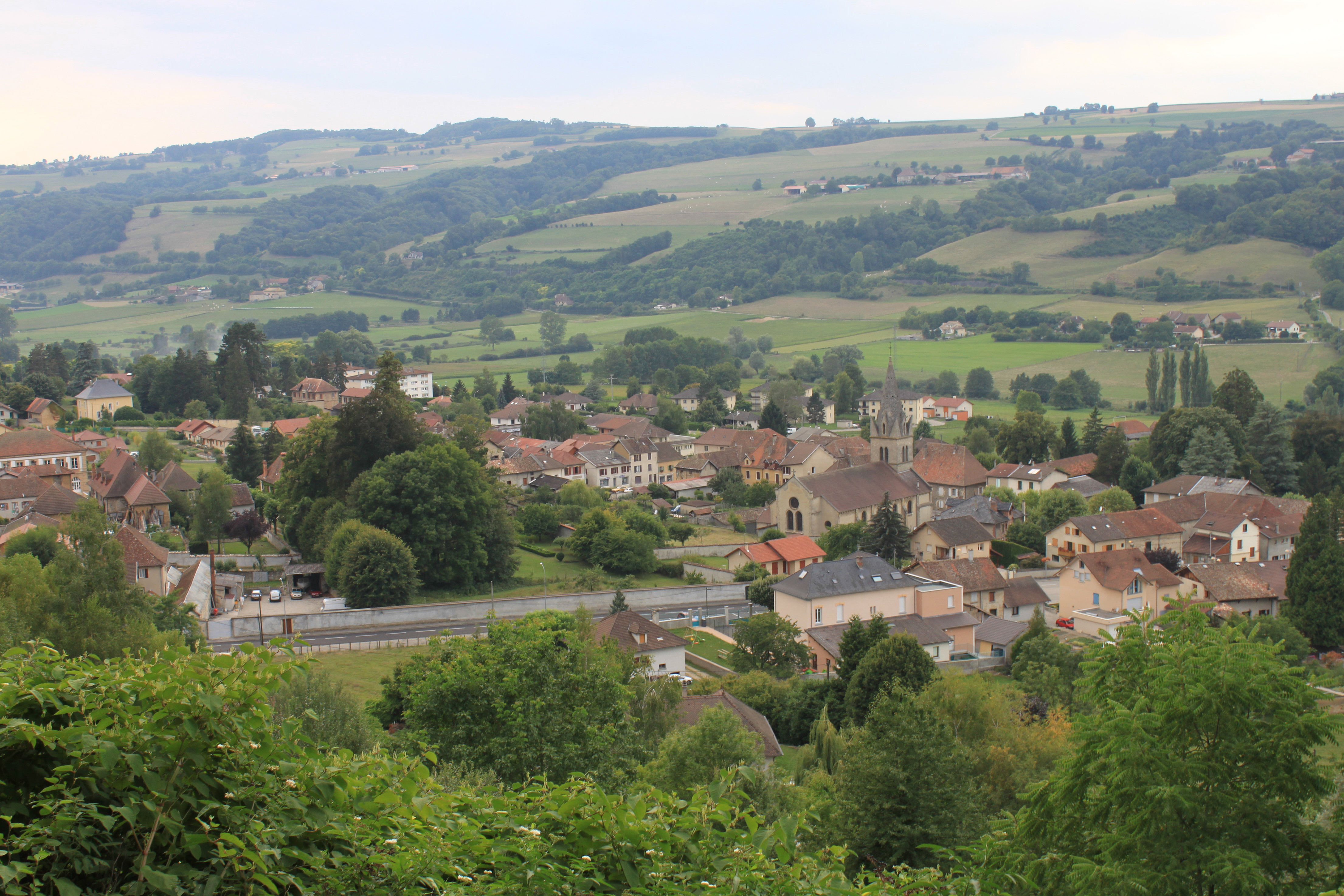 Vue sur Virieu depuis l'est